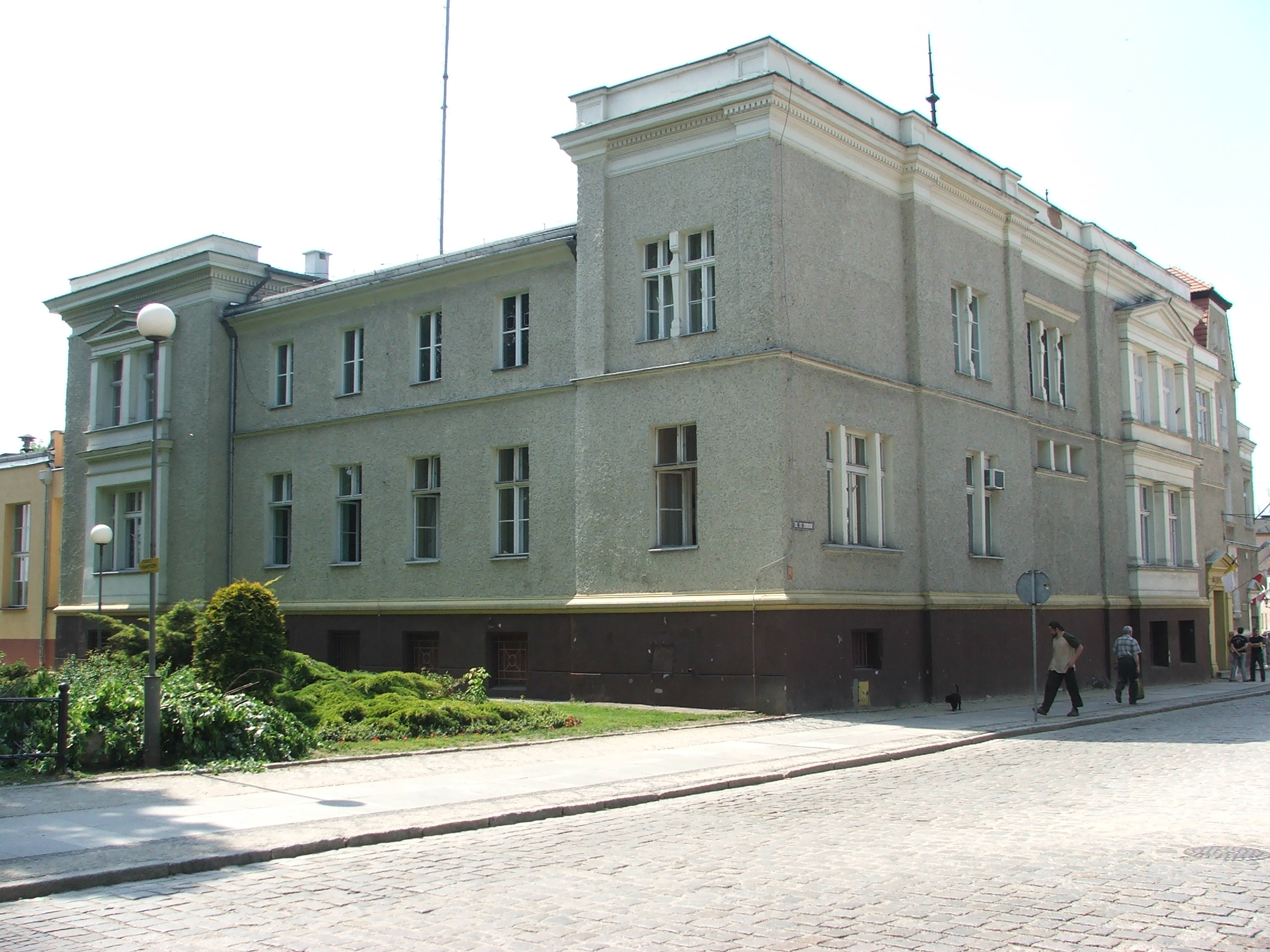 Urząd miasta Namysłów